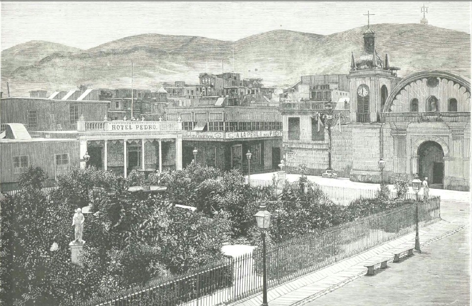 Guerra del Pacifico. La plaza principal de Chorrillos (Peru) antes de la batalla del 13 de enero